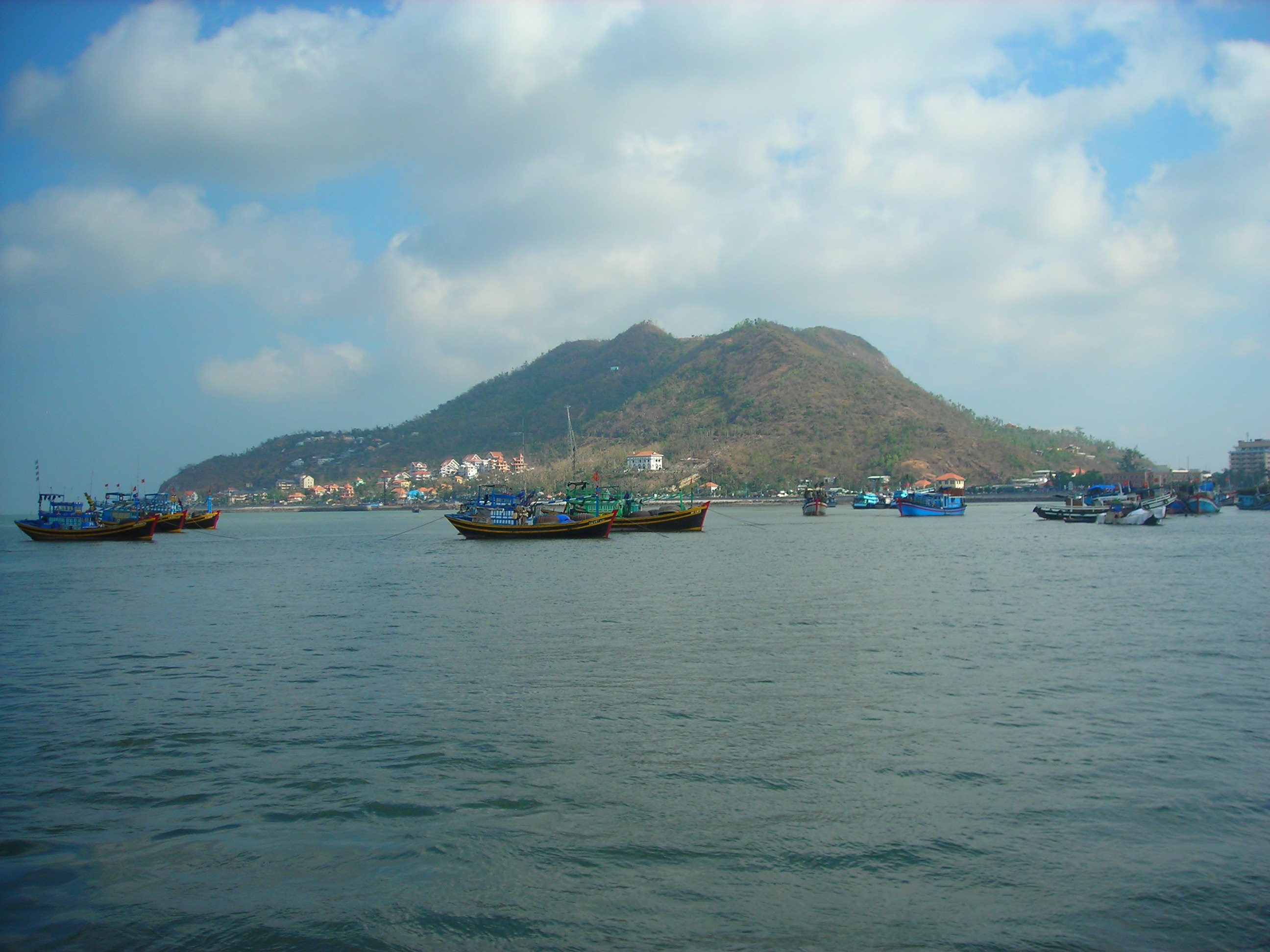 Big Mount in Vung Tau